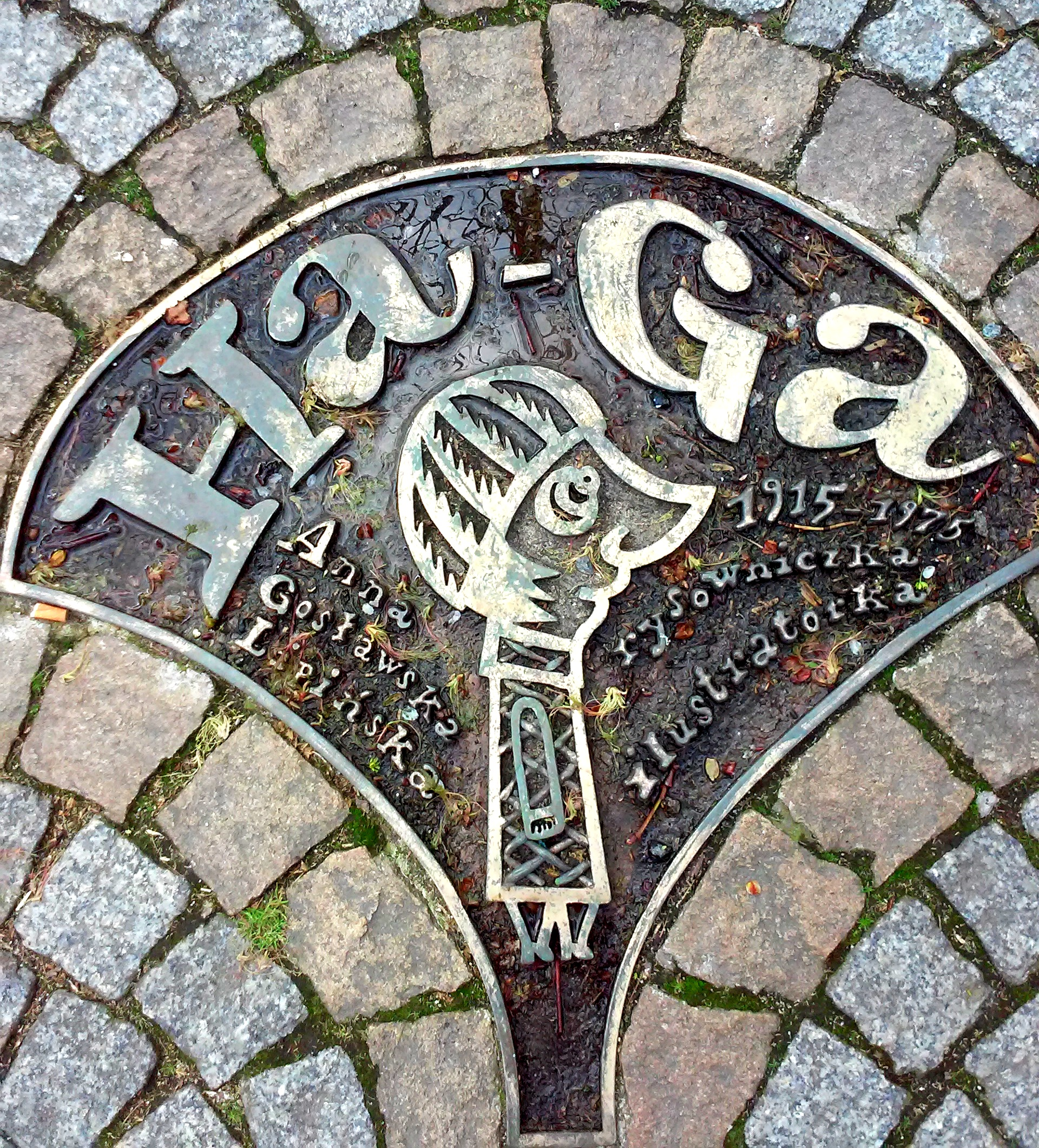 Legnica, Aleja Gwiazd Satyrykonu, tablica pamiątkowa - Anna Gosławska-Lipińska